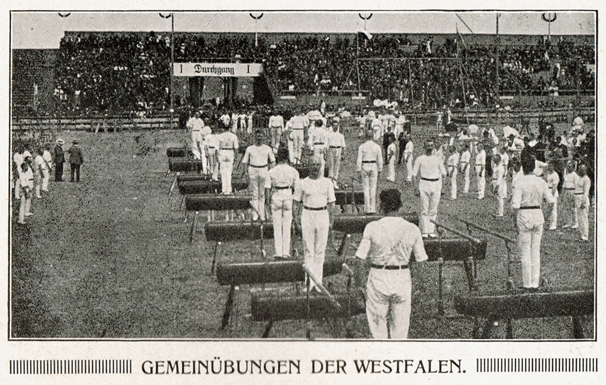 Deutsches Turnfest 1913 in Leipzig, Freiübung westfälischer Turner